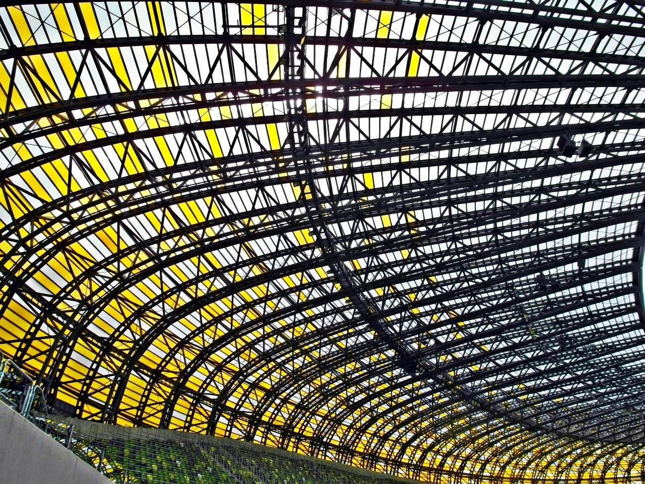 Fragment konstrukcji dachu nad trybunami stadionu.